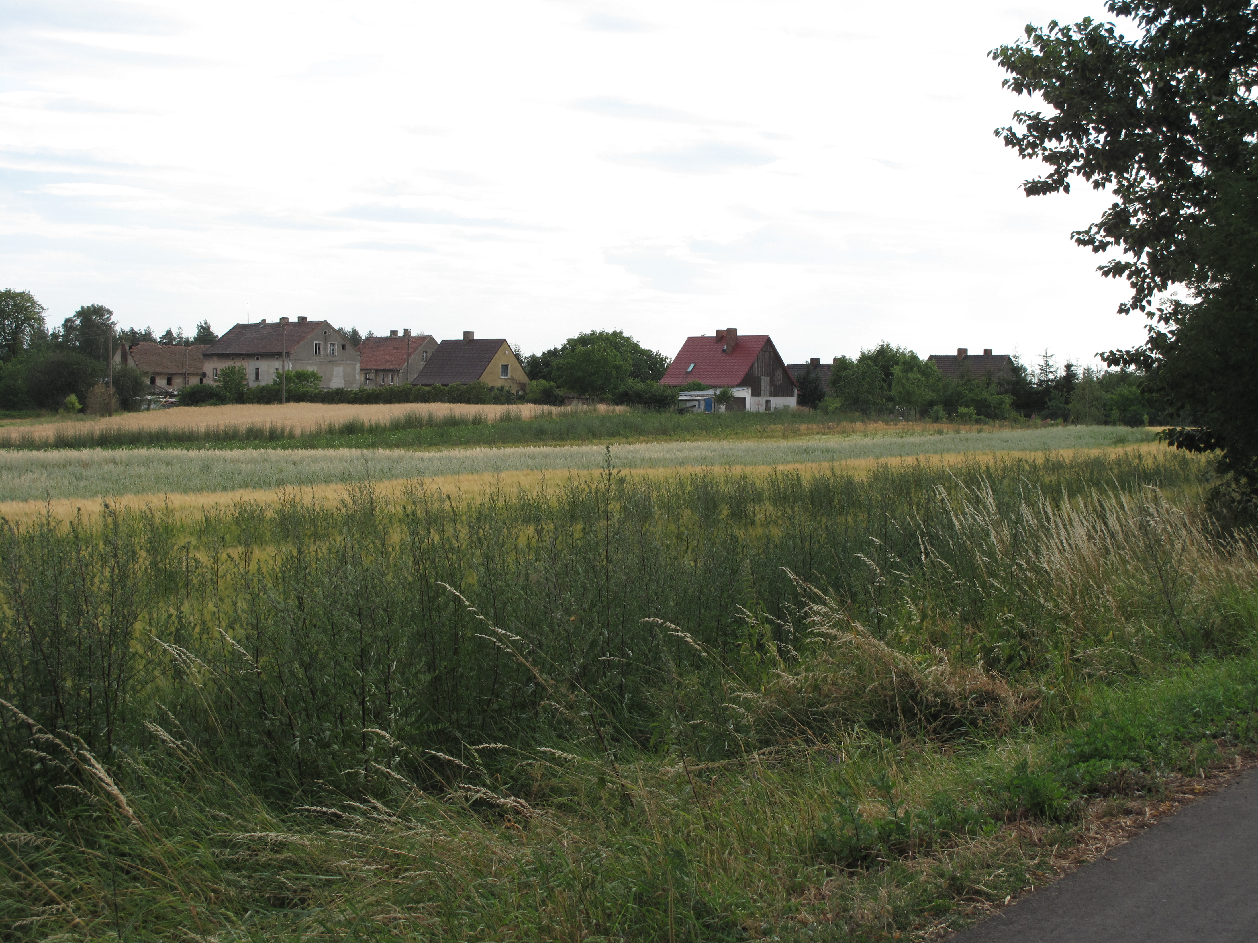 Ksawerów (województwo dolnośląskie). Polska.